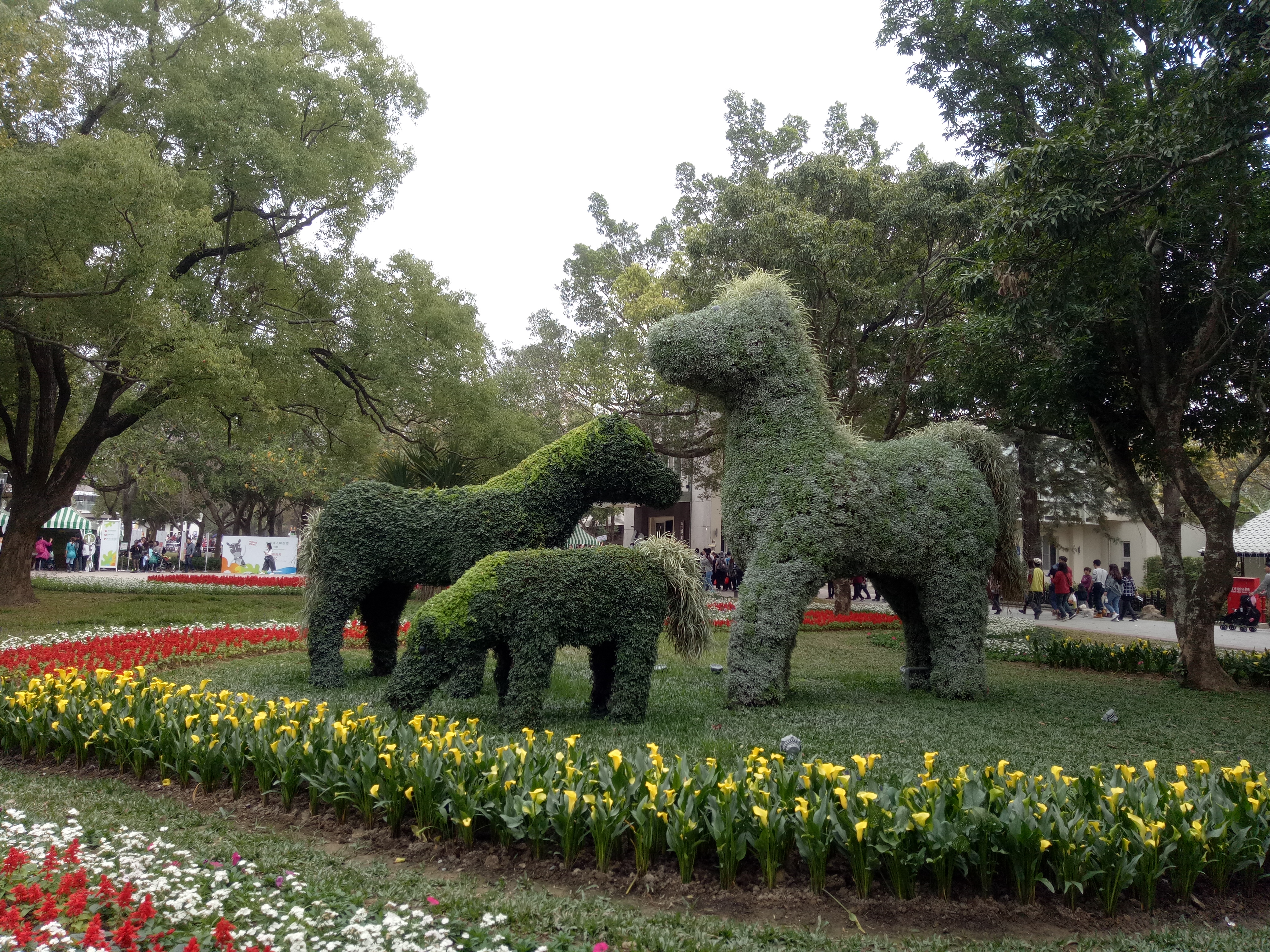 2018年臺中世界花卉博覽會，后里馬場園區